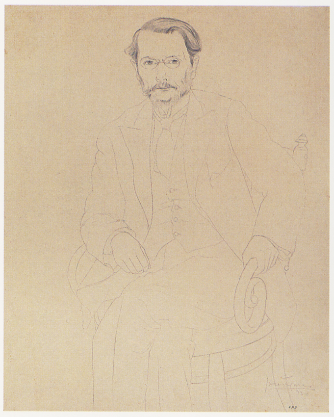 José Tagarro, Retrato do Dr. Reis Santos, 1930, grafite sobre papel, 49,8 x 39,5 cm; coleção Museu do Chiado, Lisboa